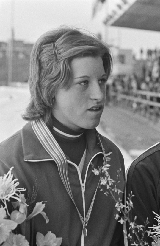 Wereldkampioenschappen schaatsen dames in Assen; Cathy Priestner